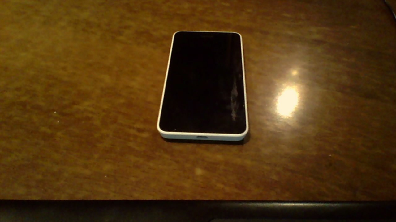 Il Nokia Lumia 635 bianco. (Mia opera)